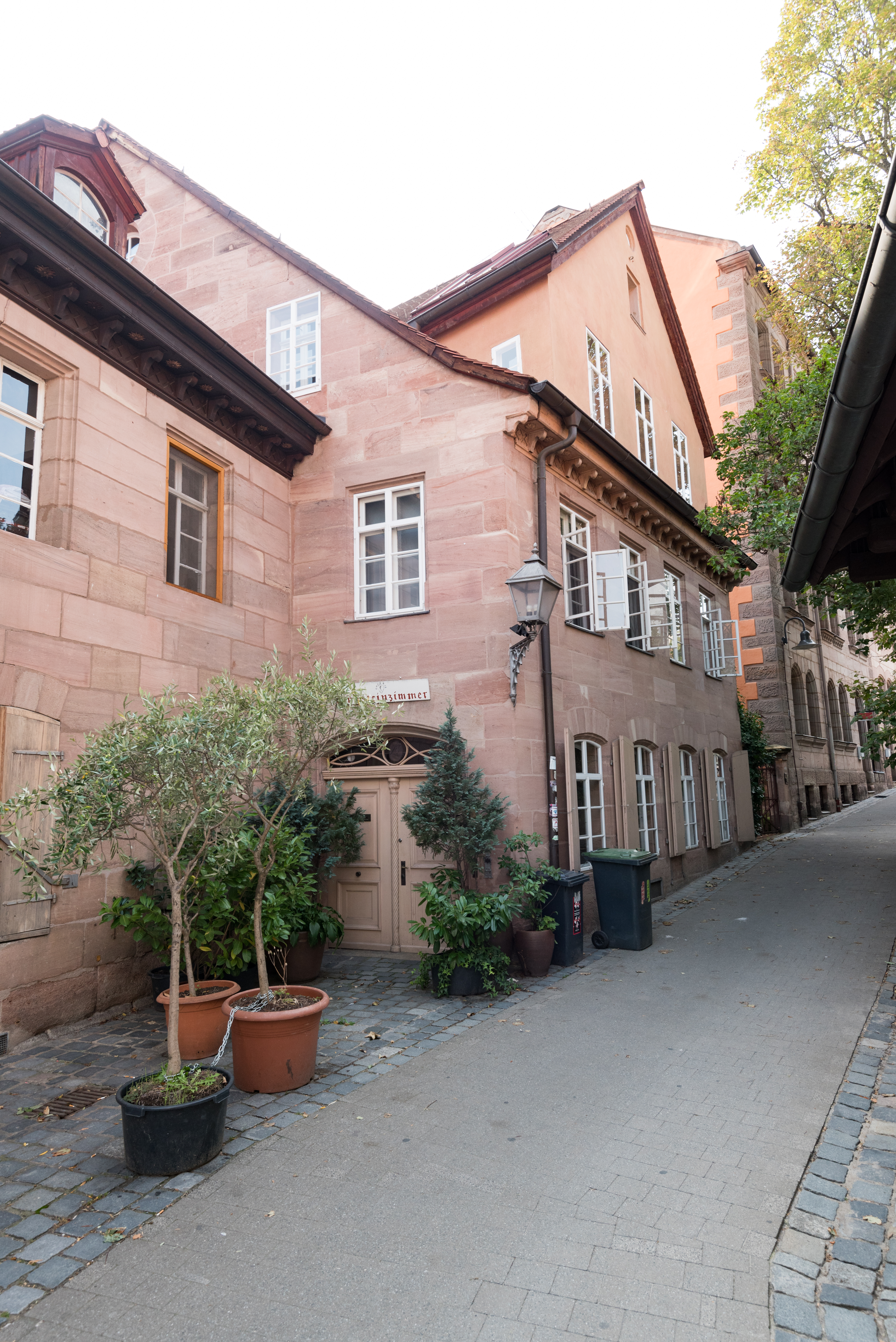 Nürnberg, Großweidenmühlstraße 9